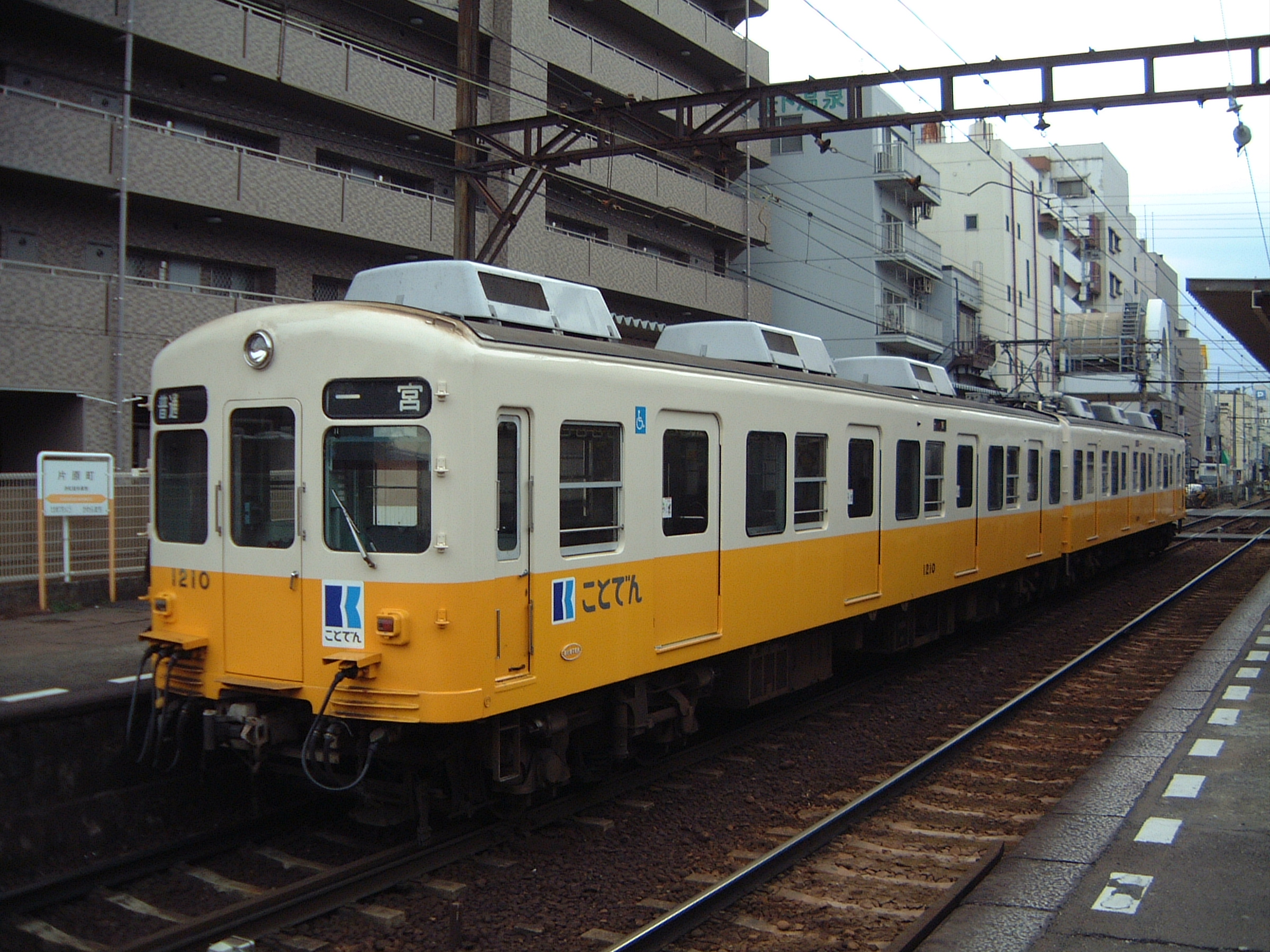 author:Fwng3431 Date:04/Jan/2006 Takamatsu-Kotohira Electric Railway Co.(Takamatsu,Japan) No.1209 and 1210 car Kataharamachi station 高松琴平電気鉄道 1209号と1210号の編成 片原町駅にて撮影